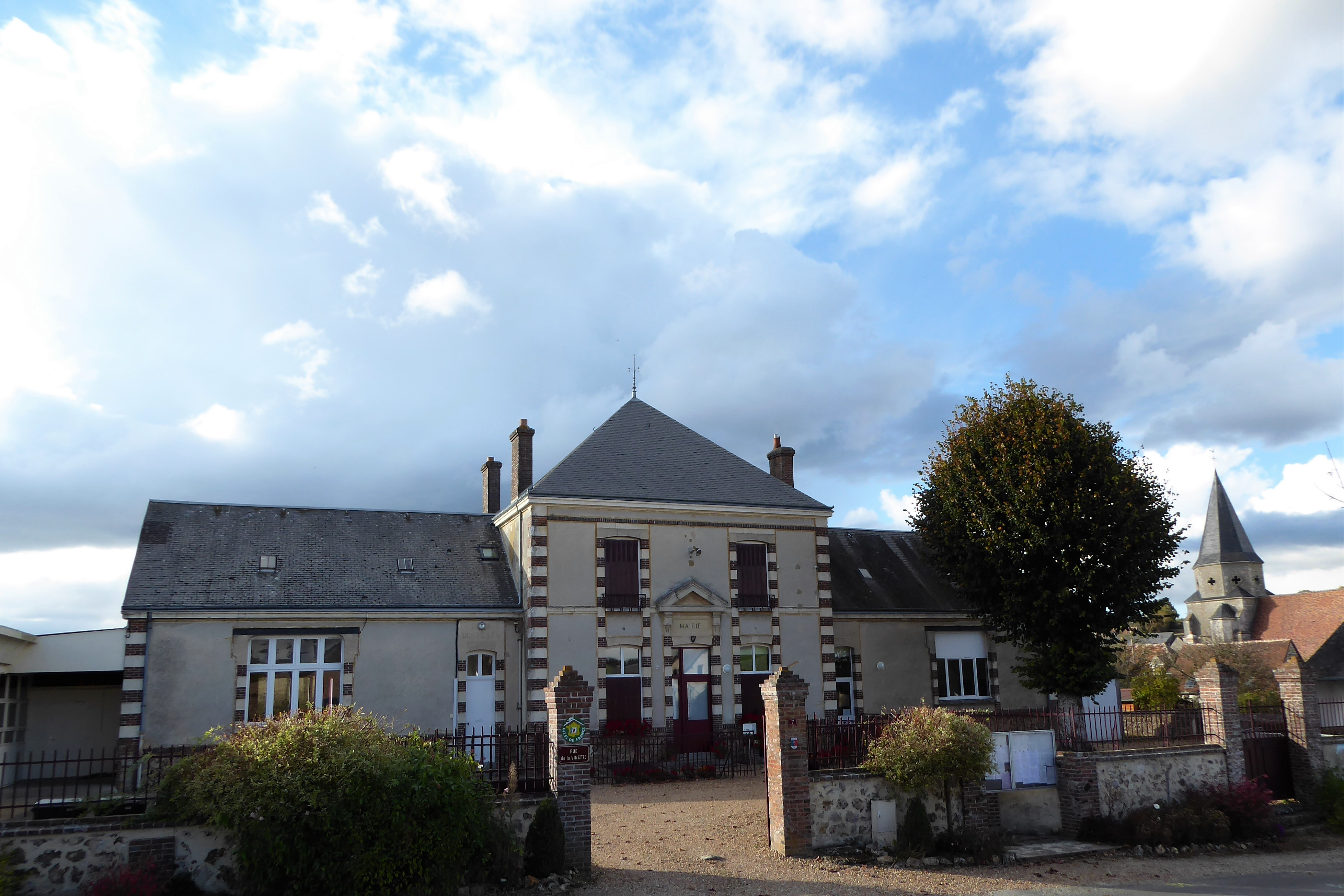 mairie et clocher de l'église Saint-Vincent, Marolles-les-Buis, Eure-et-Loir, France.